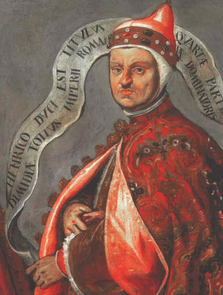 Enrico Dandolo par le peintre Domenico Tintoretto